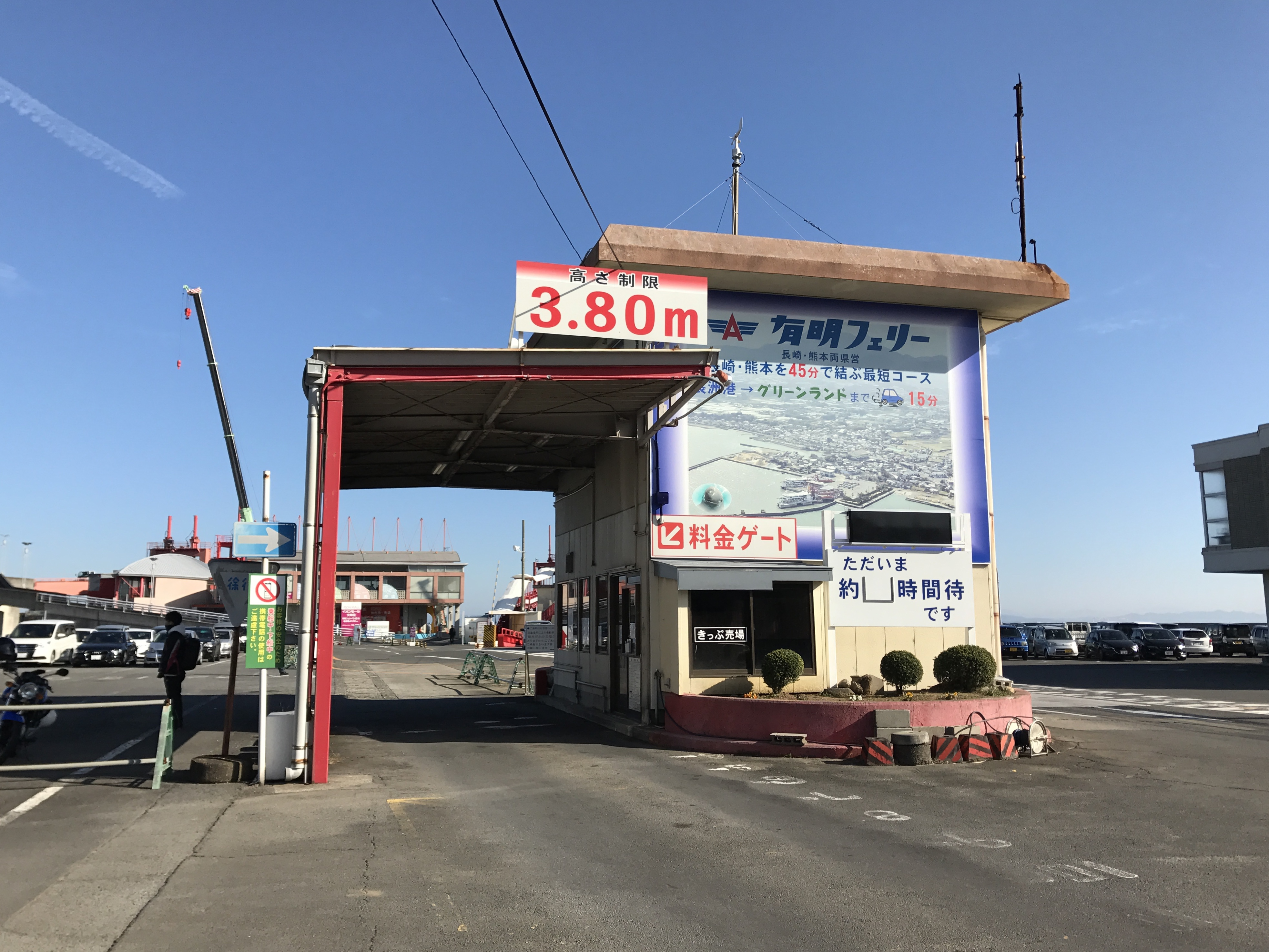 多比良港にある有明フェリーの切符売り場